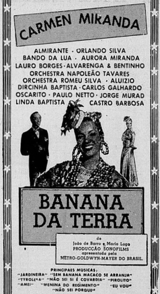 Cartaz do filme Banana da Terra (1939), apresentando Carmen Miranda.